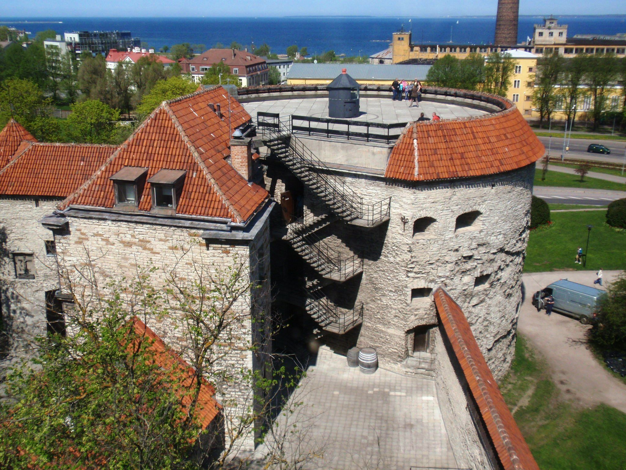 Paks Margareeta, pildistatud Stoltingi tornist.